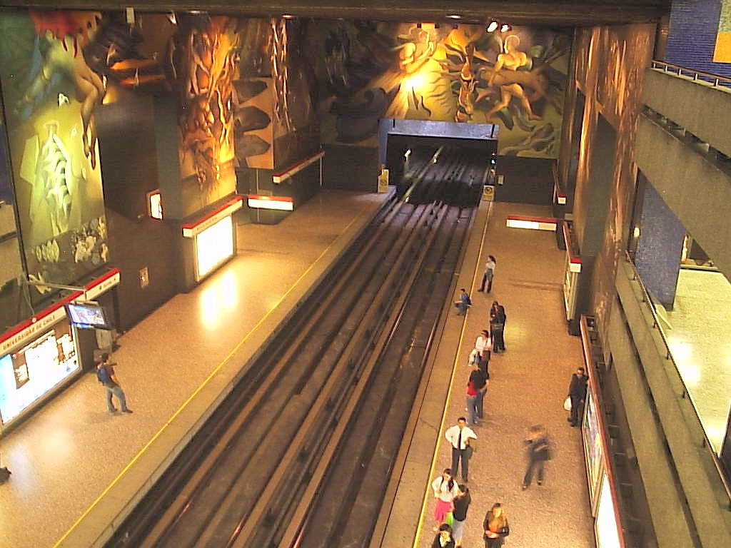 Estación Universidad de Chile (Linea 1)